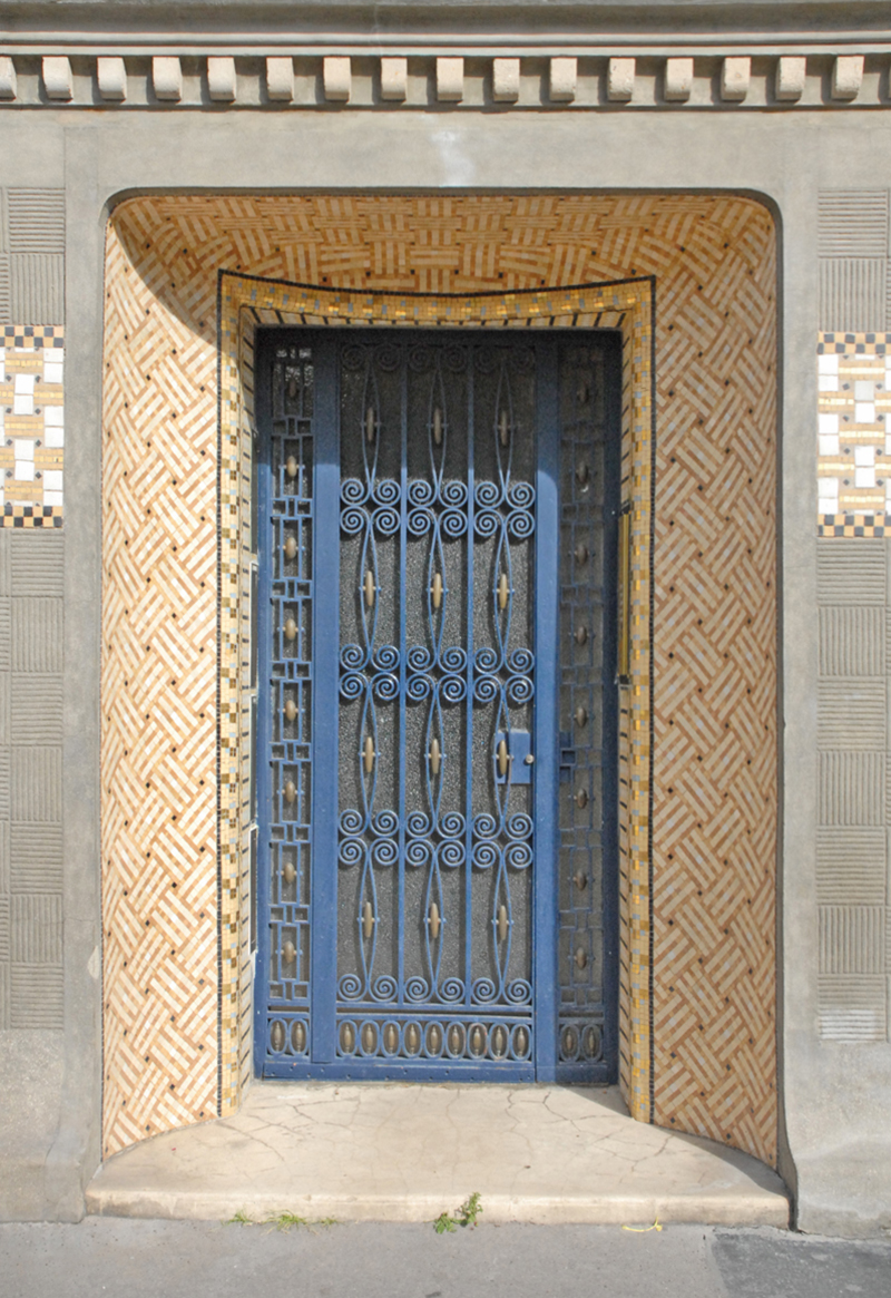 Entrée ornée de céramiques de la maison de style art nouveau tardif construite en 1911 pour le décorateur Paul Follot, 5 rue Schoelcher, à Paris